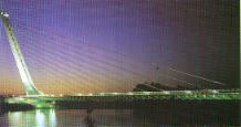 L'IMMAGINE DEL PROGETTO DEL FUTURO PONTE DELL'ARCHITETTO SPAGNOLO SANTIAGO CALATRAVA CHE SORGERA' NELLA CITTA' DI COSENZA